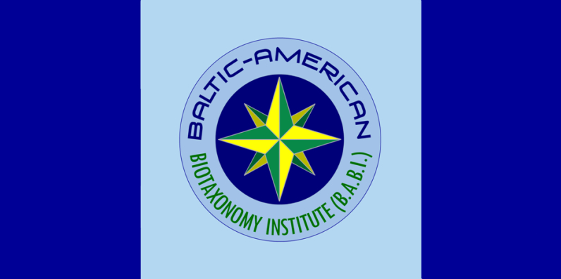 B.A.B.I. vėliava